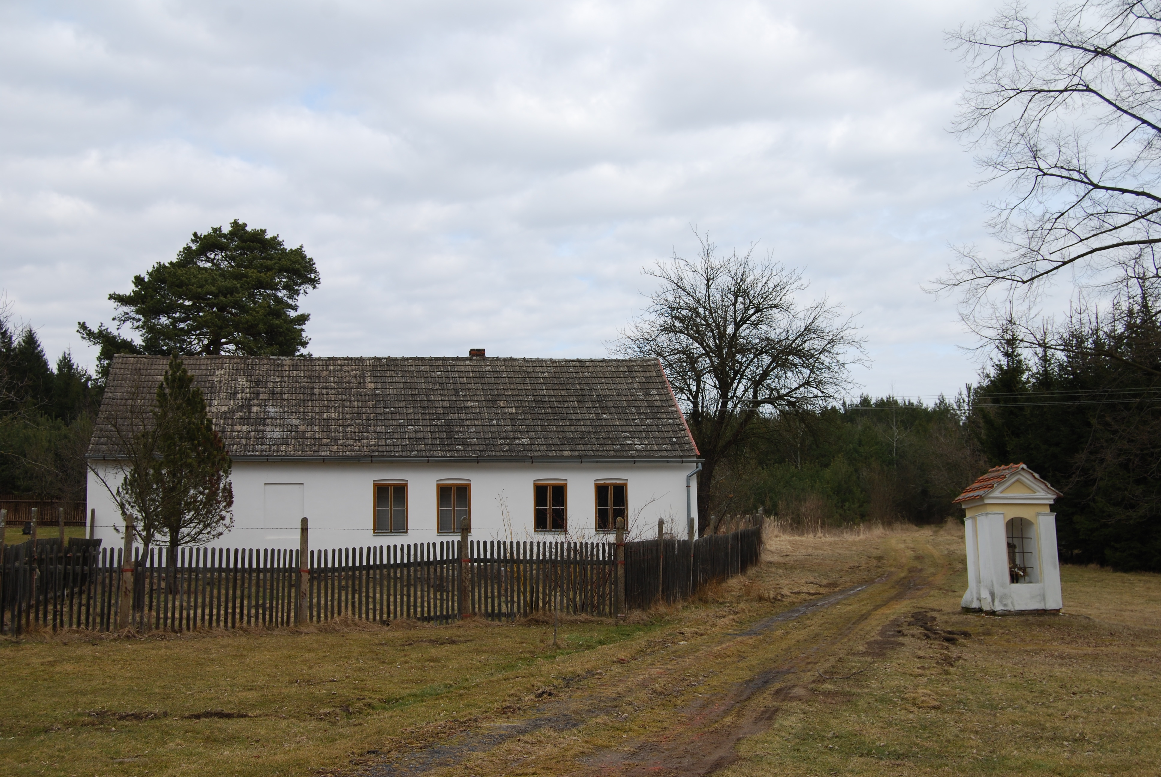 Usedlost v obci a výklenková kaple. Karlov-Nepomuk je vesnice, část obce Dražíč v okrese České Budějovice. Česká republika.